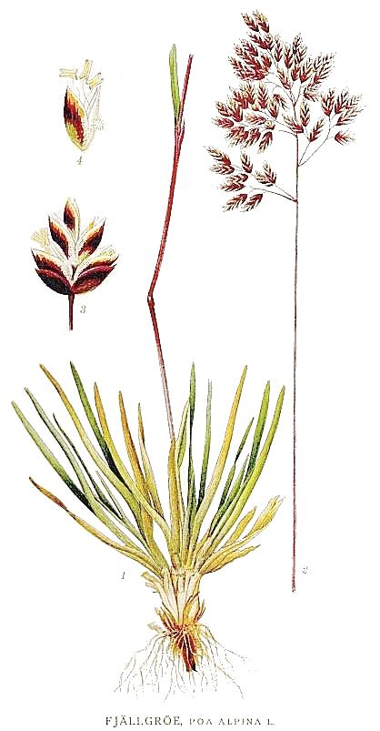 Poa alpina L. Original Description "Fjällgröe", Poa alpina L.